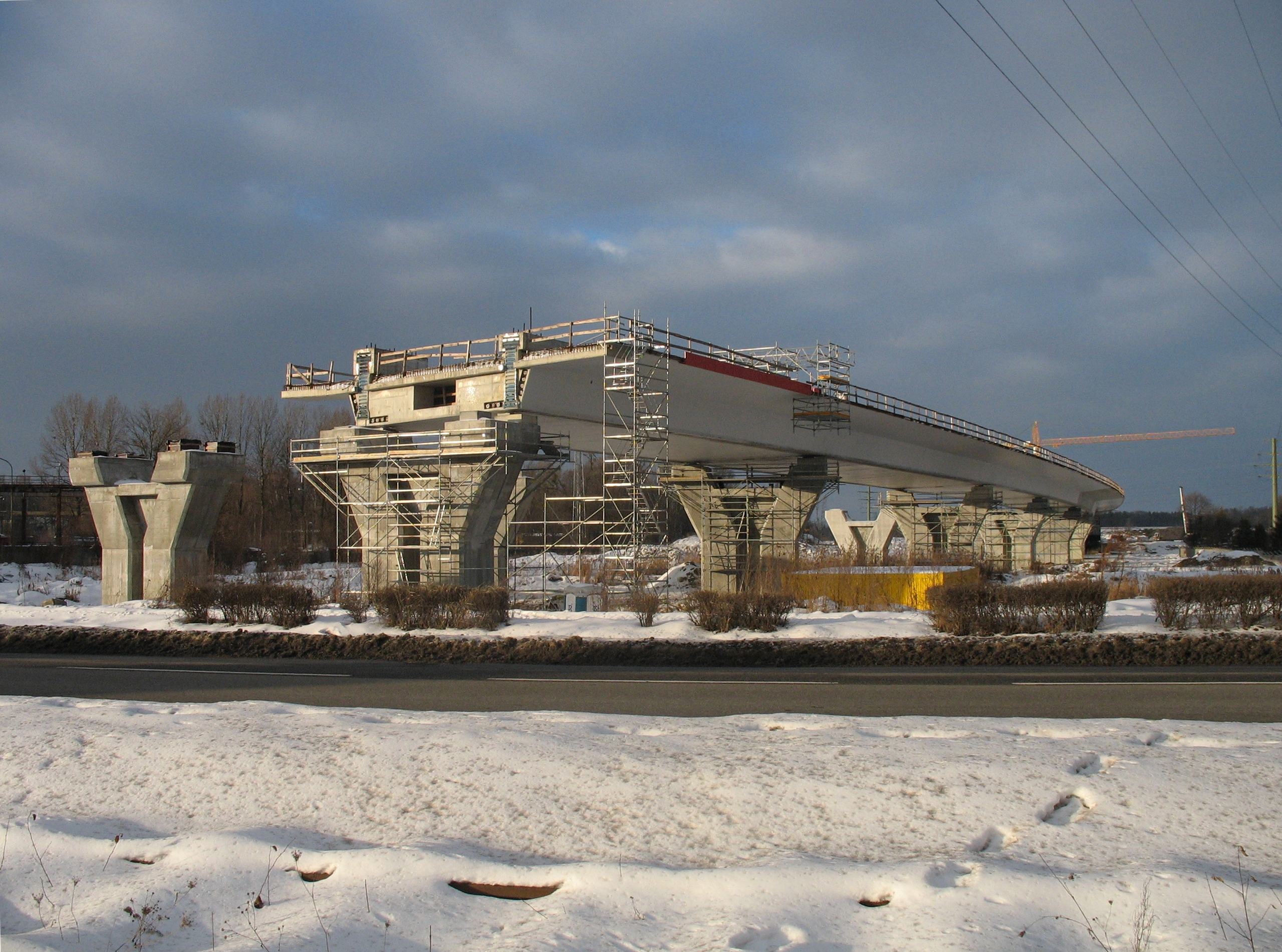 Budowa estakady autostrady A1 nad ulicą Chorzowska.